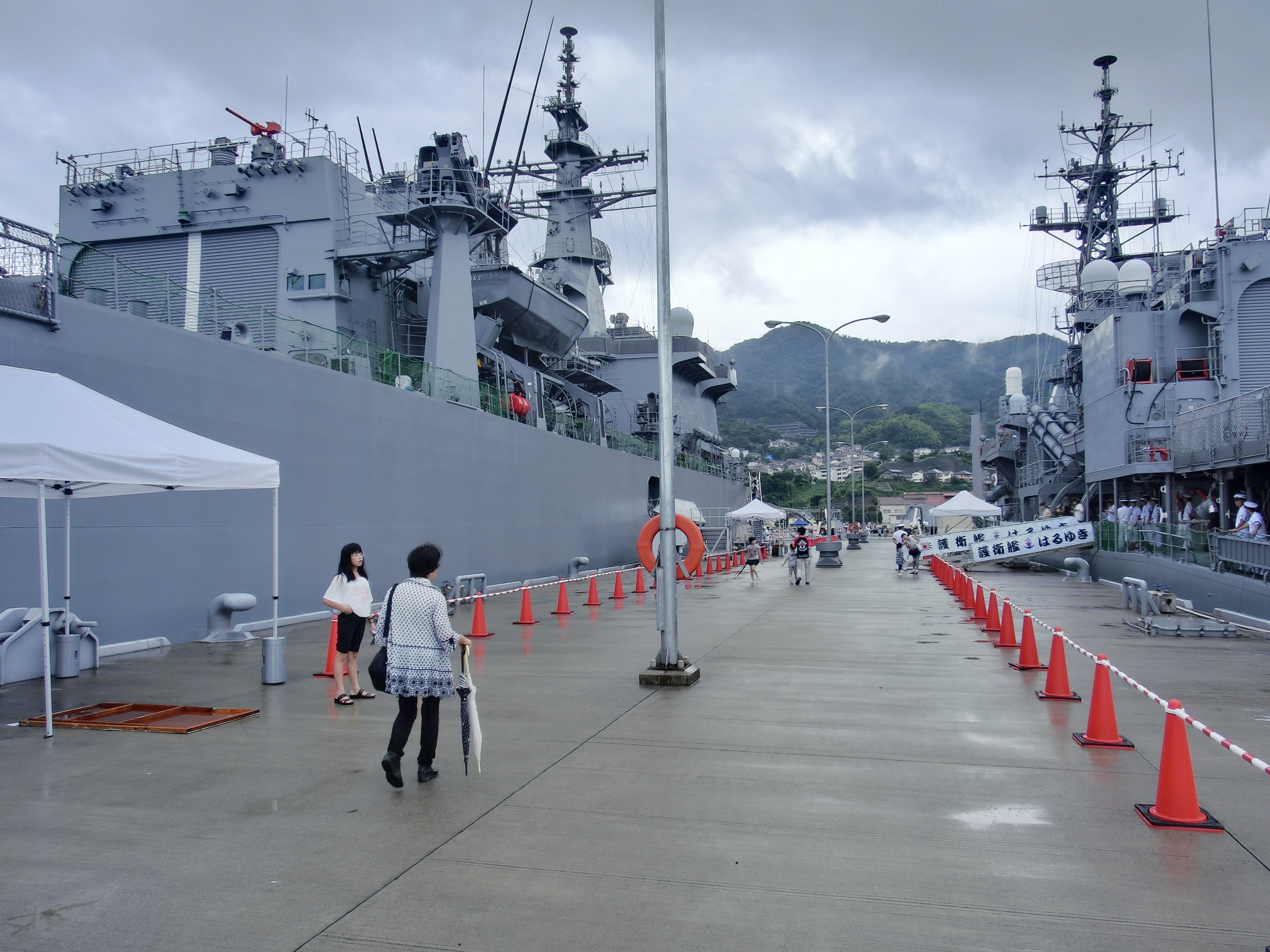 掃海母艦ぶんごと護衛艦はるゆき、呉基地2013年8月